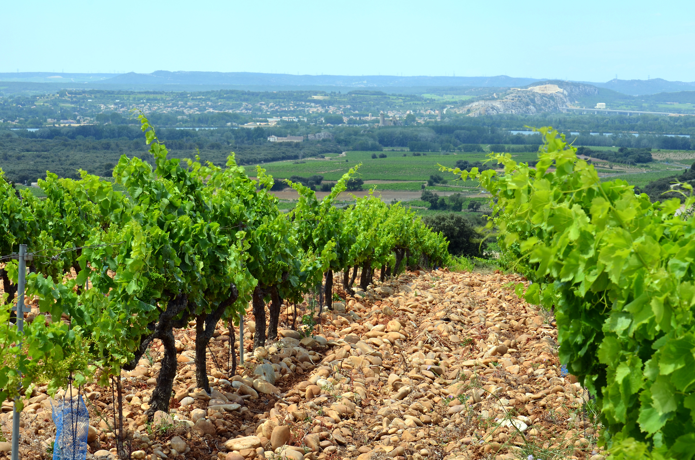 Châteauneuf-du-Pape, Blick nach Norddwesten, Weinanbau, im Hintergrund die Rhone